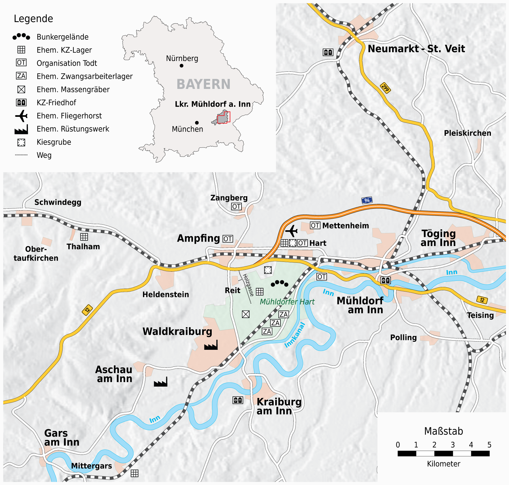 Ehemalige Lagerkomplexe und Rüstungsanlagen im Lkr. Mühldorfund Situationsplan vom Außenkommando Mühldorf des KZ Dachau This map is the result from a map request to the Kartenwünsche in the Kartenwerkstatt. You can make a request for a new map to us as well.